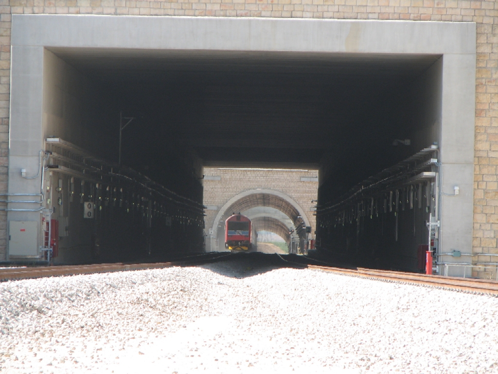 מנהרות הרכבת מתחת לכביש 1 ולגבעה